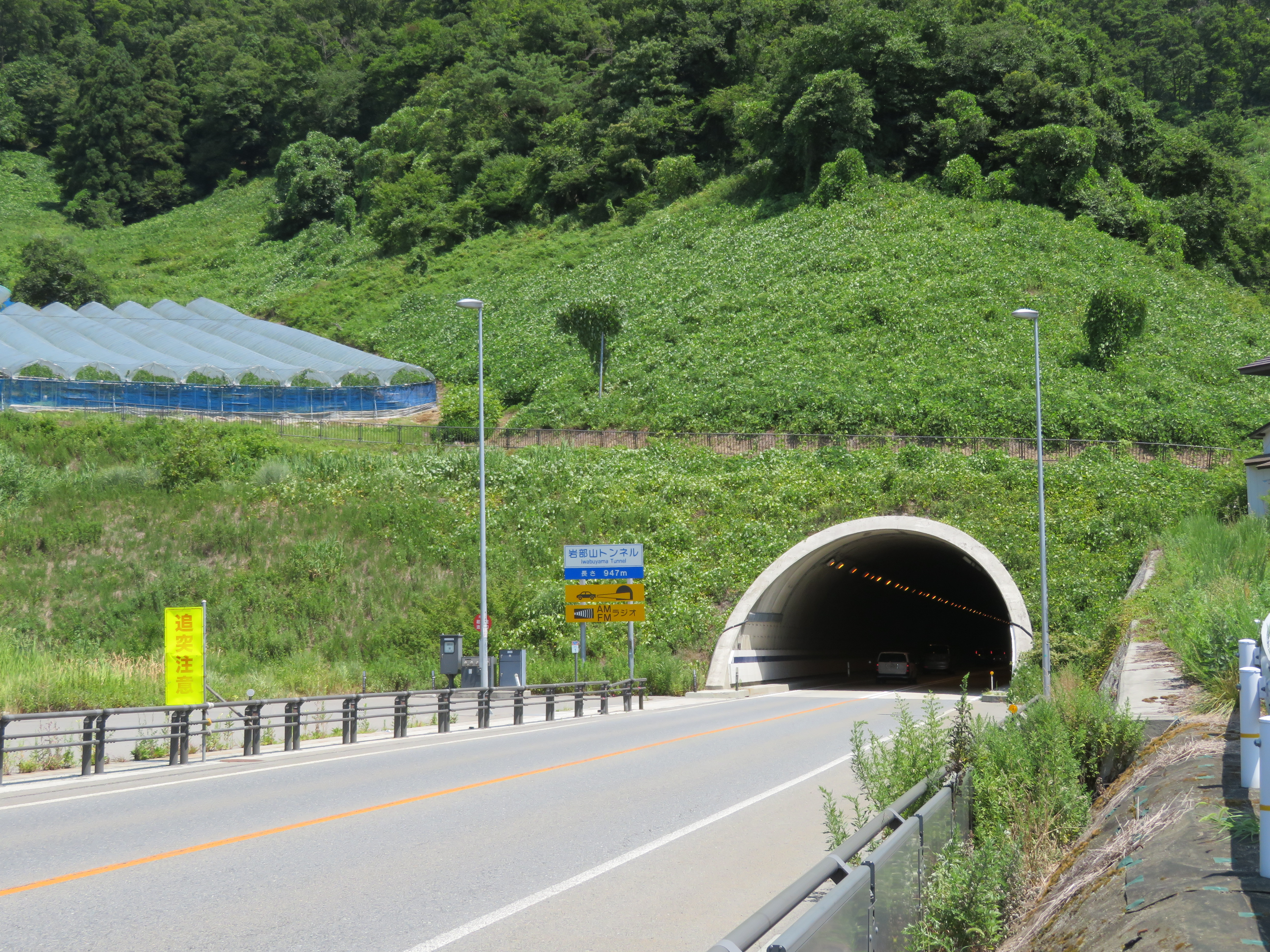 国道13号線上山バイパス岩部山トンネル（米沢方面側坑口付近を撮影） Canon PowerShot SX720 HS